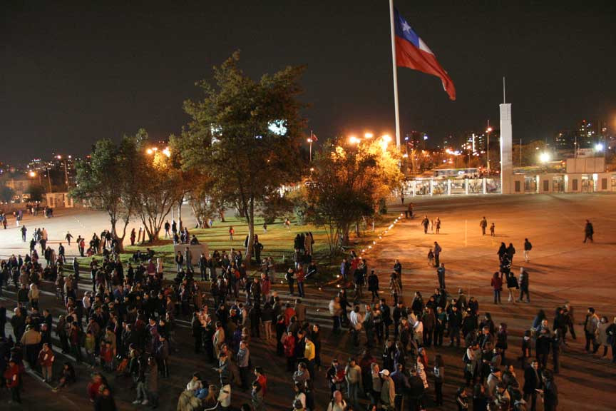 Interior de la Escotilla Nº8. Estadio Nacional. Chile.